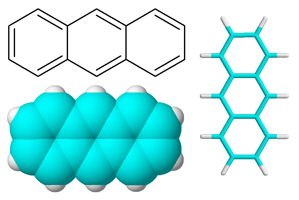 Anthraceen, weergegeven in 2D, 3D baal-and-stick en 3D spacefilled. Lichtblauw = koolstof, wit = waterstof